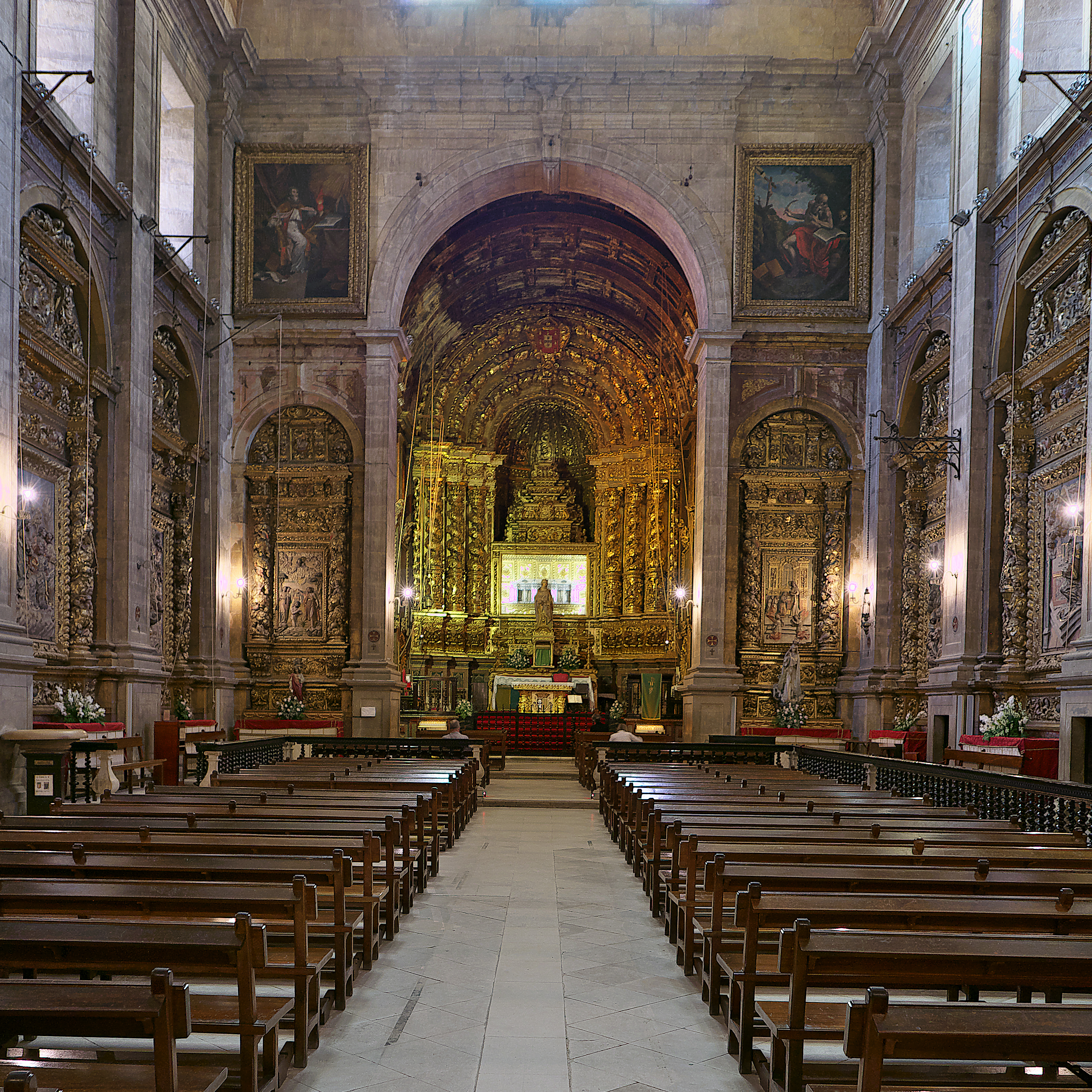 Interior de la iglesia conventual.